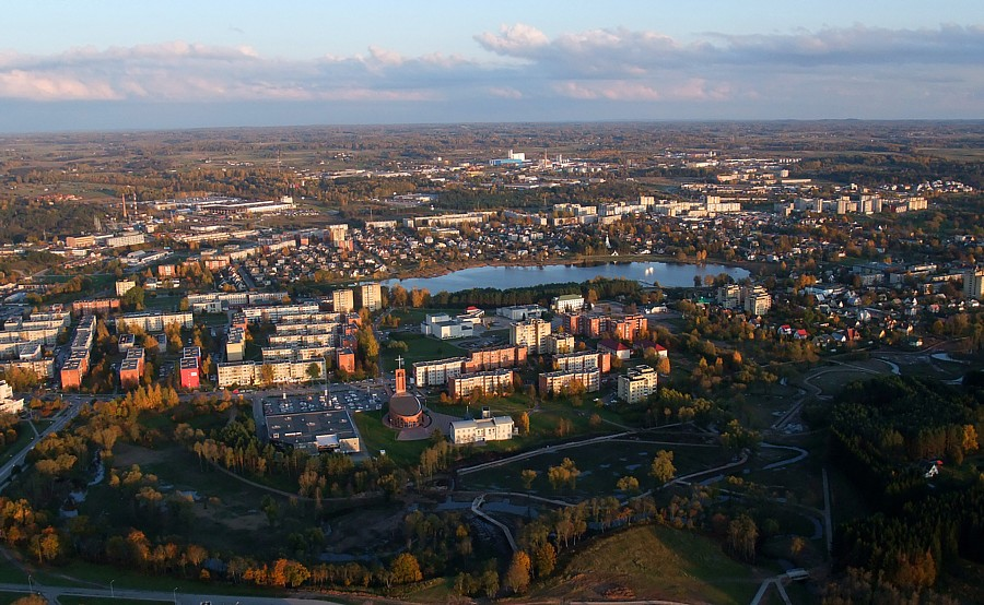 Utena 1